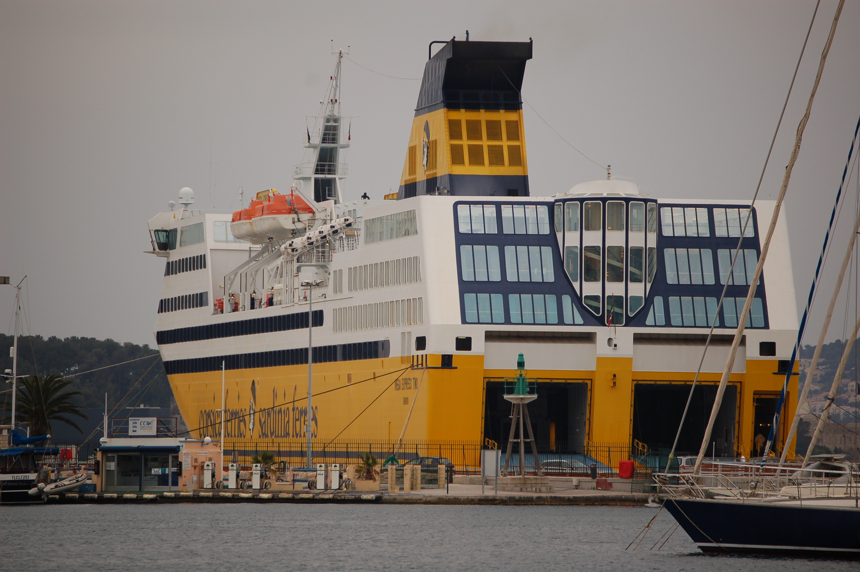 Bateau corsica ferries de dos; Mega Express Two